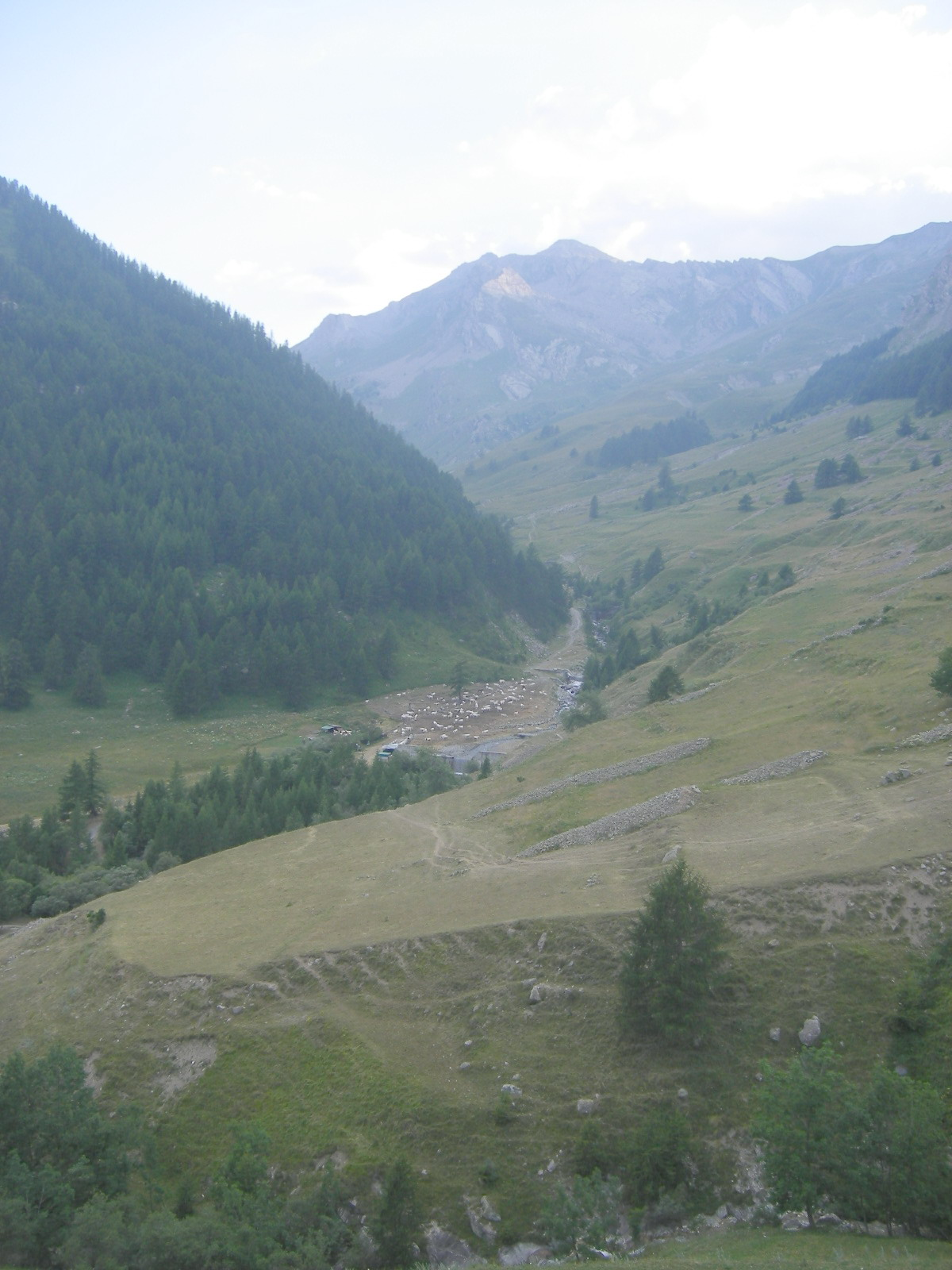 Between Argentera and Colle della Maddalena (Argentera municipality)